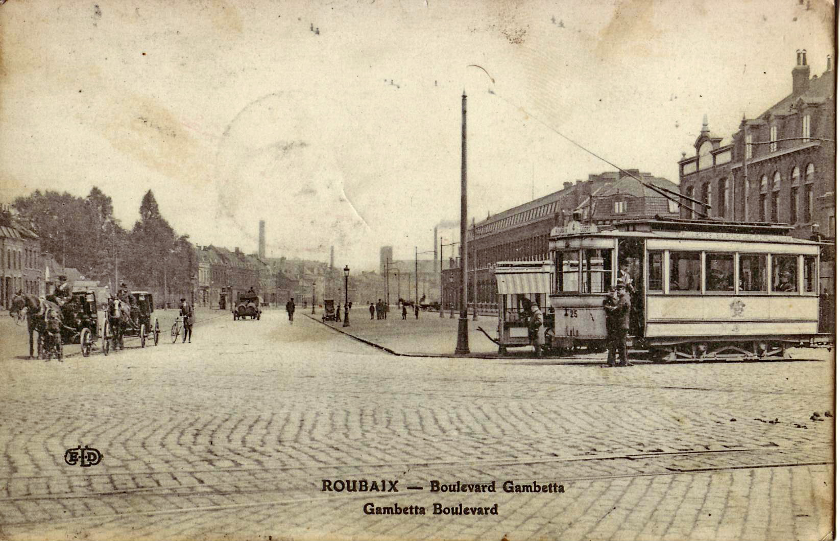 Carte postale ancienne éditée par ELD : ROUBAIX - Boulevard GambettaVue en gros plan d'un tramway électrique, motrice n°25